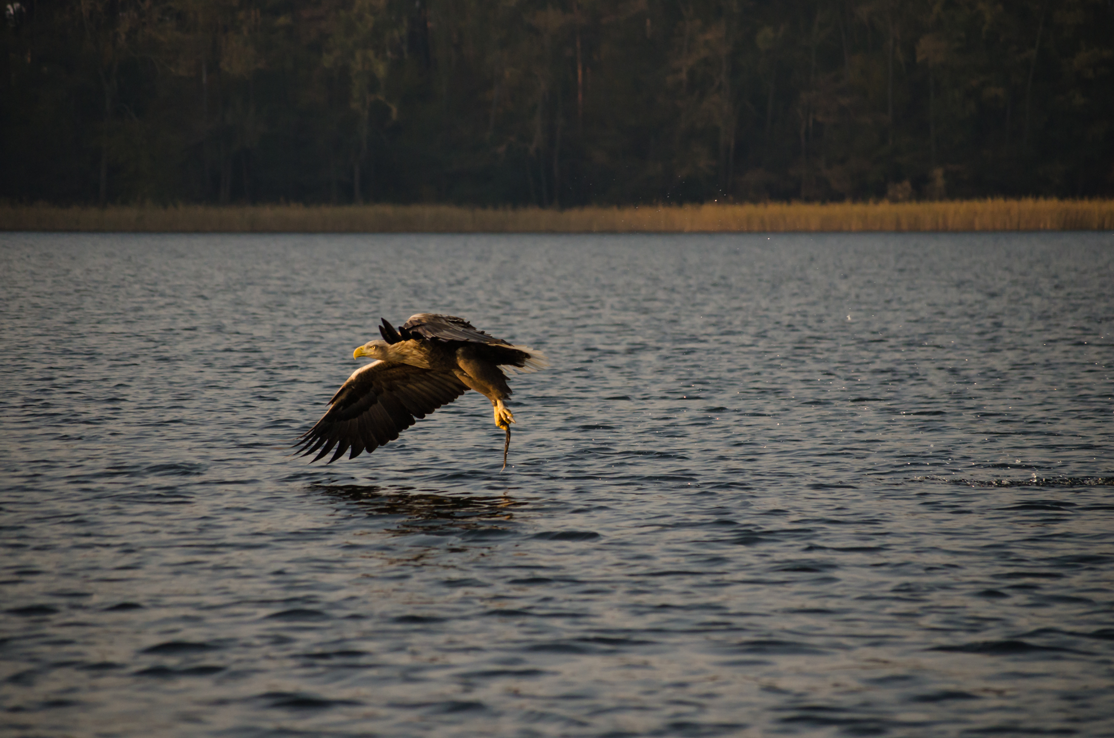 Seeadler raubt Aal